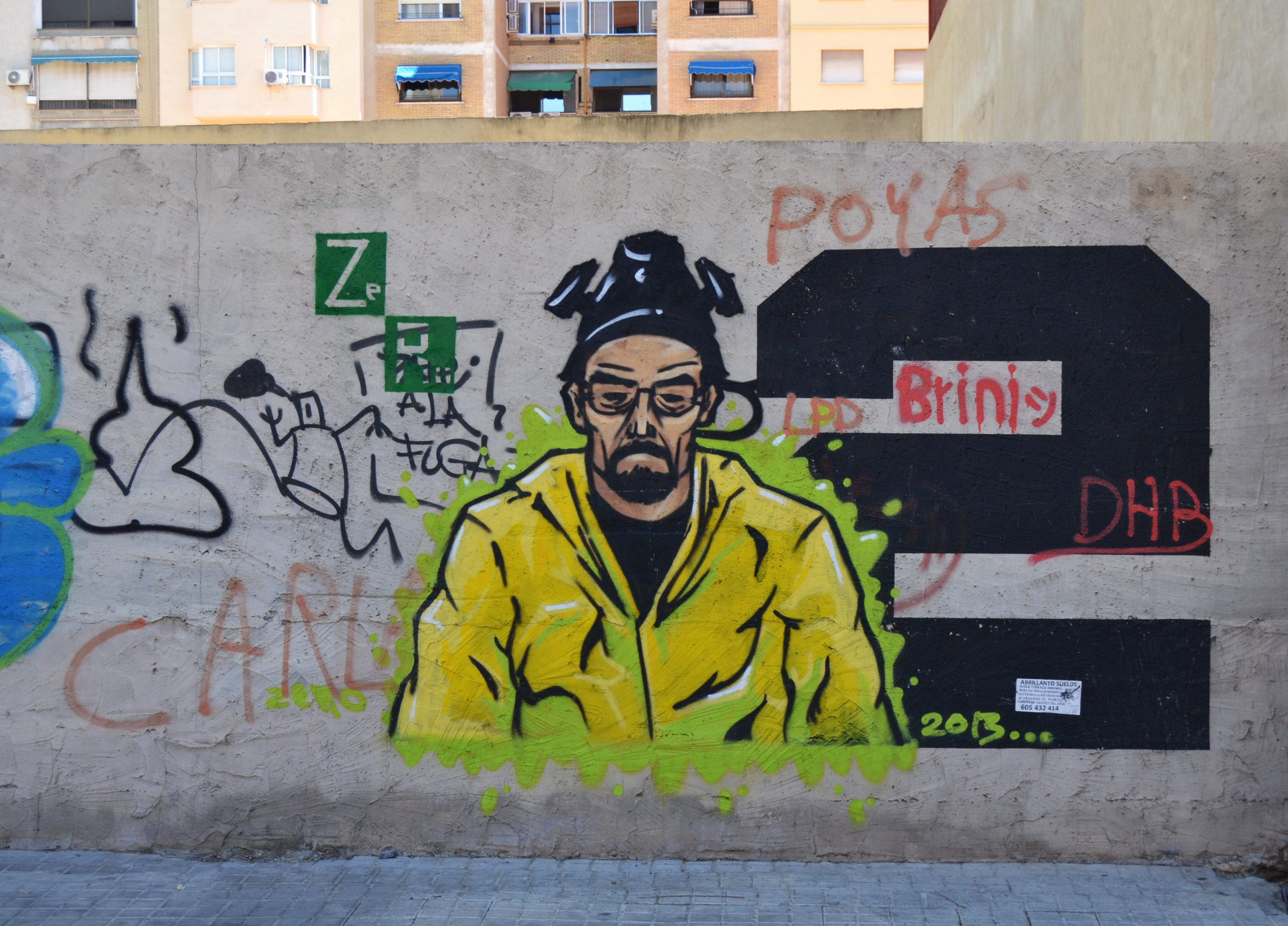 Walter White al carrer d'Antoni Suárez, València.